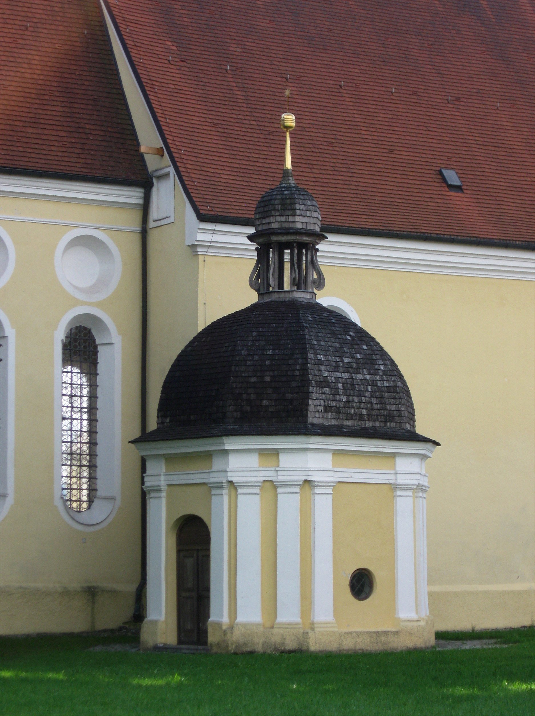 Zugspitzstraße 13. Kath. Wallfahrtskirche Hl. Blut am Wasen, Saalbau, Chor im Kern spätgotisch, 1686/87 barockisiert, Langhaus 1610/11, dem Chor um 1690 angeglichen; mit Ausstattung; Brunnenkapelle, gen. "Der Brunn", Achteckbau mit schindelgedeckter Laternenkuppel, Johann Mayr d.Ä. von der Hausstatt, Ende 17. Jh.; mit Ausstattung; nördlich neben der Kirche.